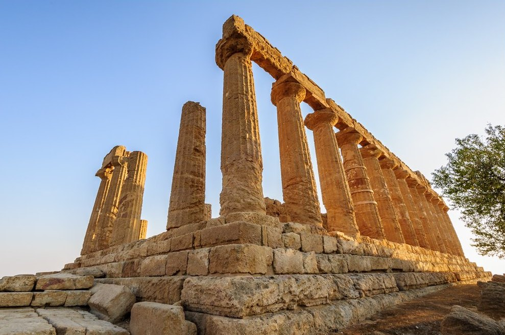 Agrigento, Sicily